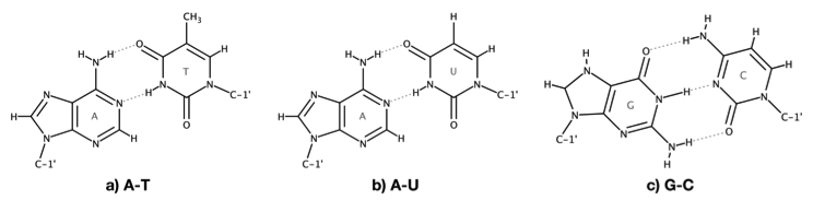 a) Adenina y timina apareadas por dos puentes de hidrógeno comúnmente hallado en el DNA b) Adenina y uracilo apareadas, en el caso del RNA, c) Apareamiento de guanina y citosina, unidas por tres puentes de hidrógeno.